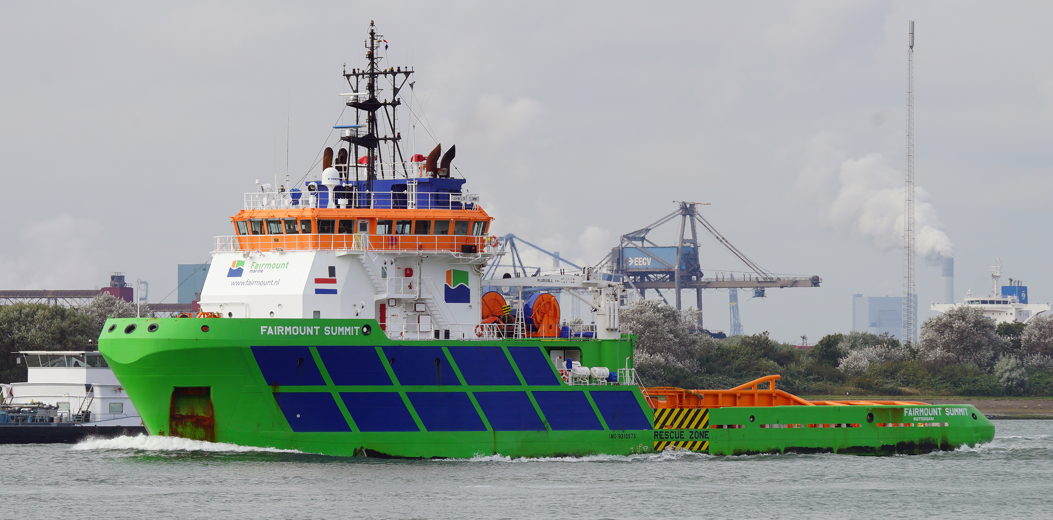 Nieuwe Waterweg 12-10-2016